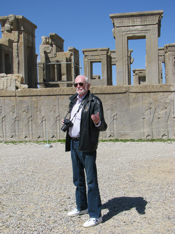 فرانک پیرسون، زمستان ۱۳۸۷ در تخت جمشید